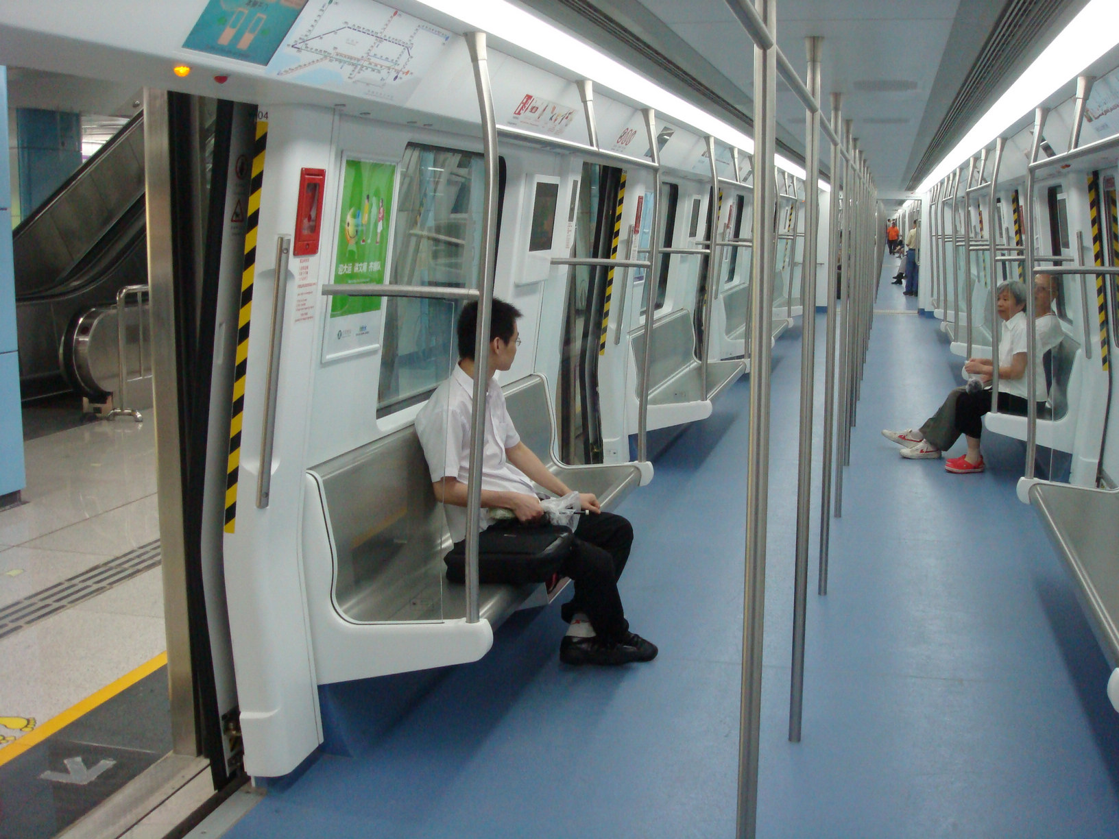 深圳地铁环中线列车车厢内部。